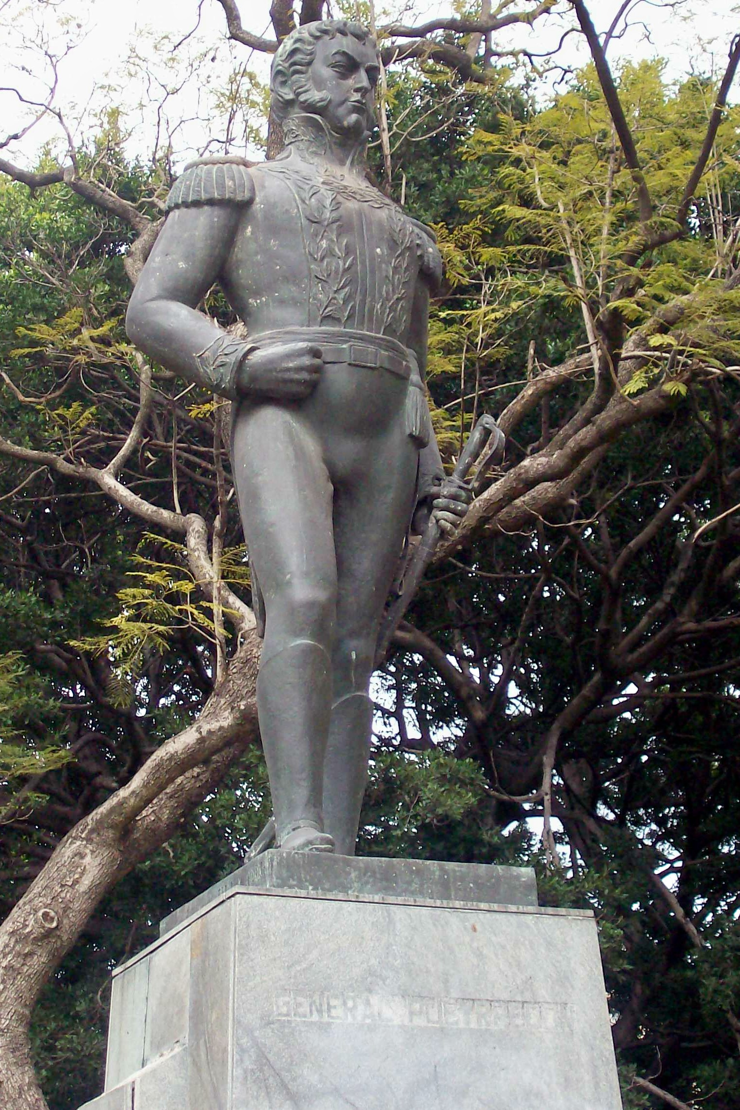 Monumento a Juan Martín de Pueyrredón por Wilfredo Villadrich en Plaza República de Chile, Parque Tres de Febrero, Buenos Aires.